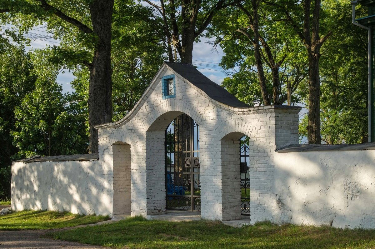 Кавалі. Свята-Успенская царква. Брама